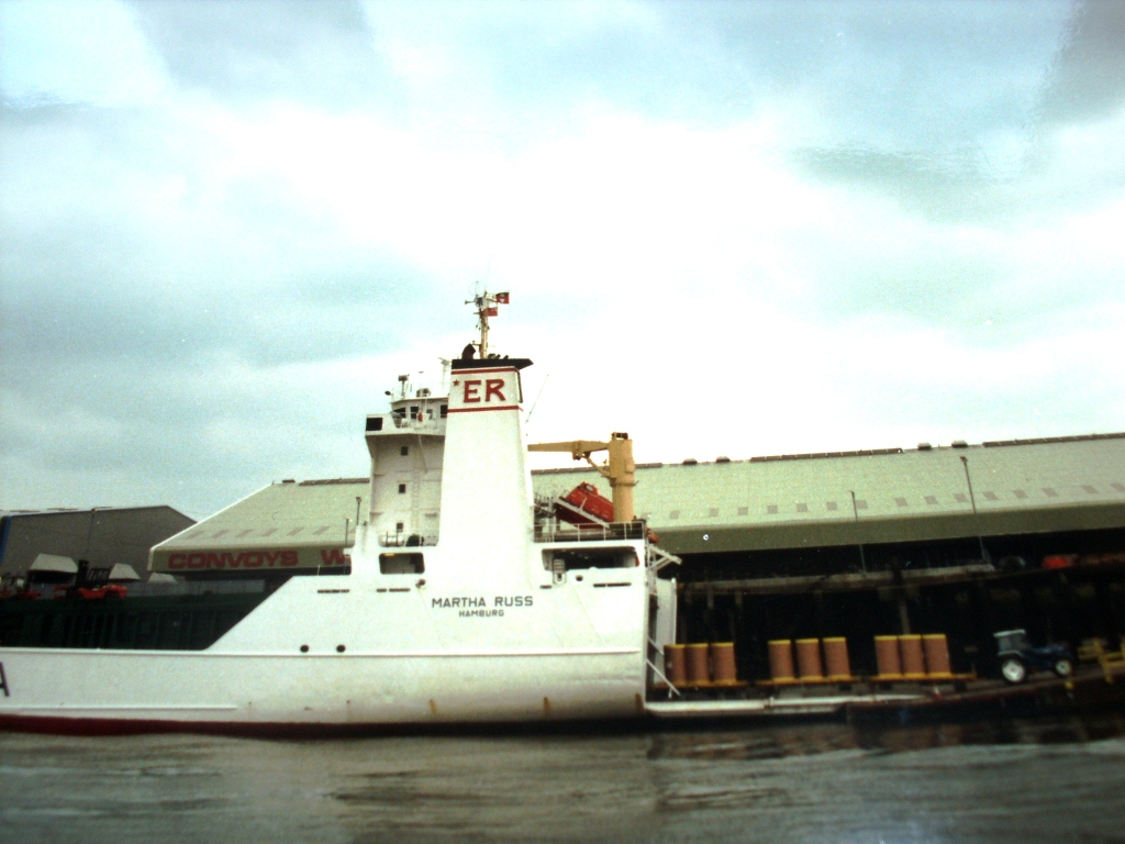 RORO-Schiff Martha Russ in London